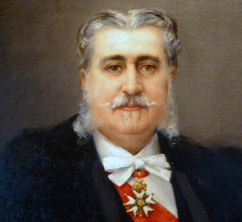 Prince George Stirbei (1832-1925)